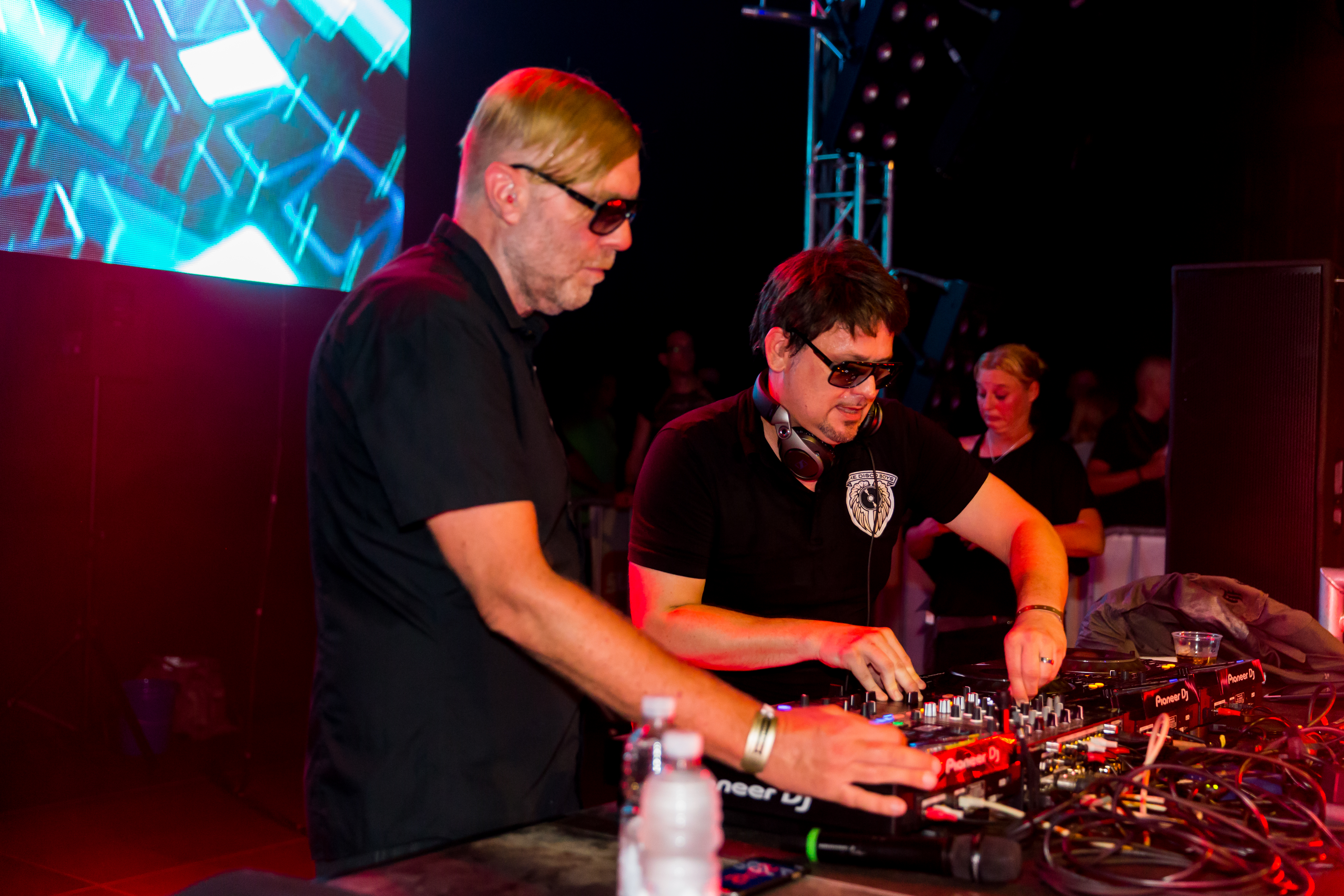 The Disco Boys during Sunshine Live - Die 2000er Live on Stage at Maimarkt Club, Mannheim, Baden-Württemberg, Germany on 2016-09-10, Photo: Sven Mandel